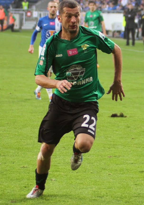 Łukasz Mierzejewski w barwach Górnika Łęczna